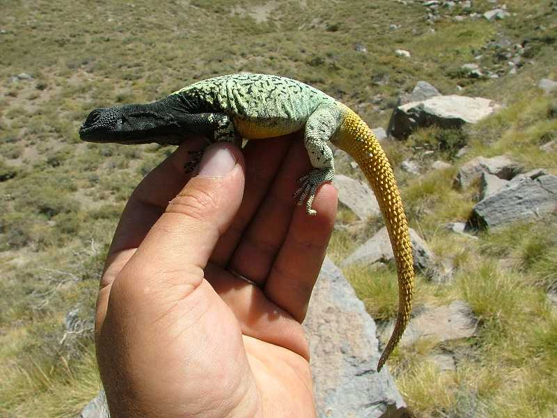 Ejemplar adulto macho de Phymaturus verdugo